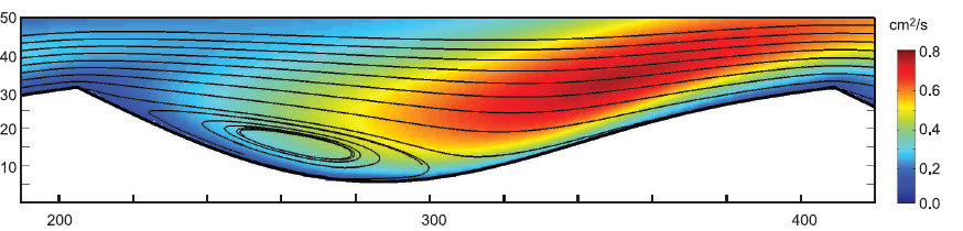 Ecoulement turbulent sur une cannelure